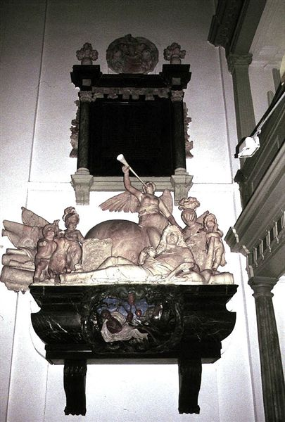 Kappeln Kirke (Kappel) i Sydslesvig. Gravmæle over Detlef von Rumohr